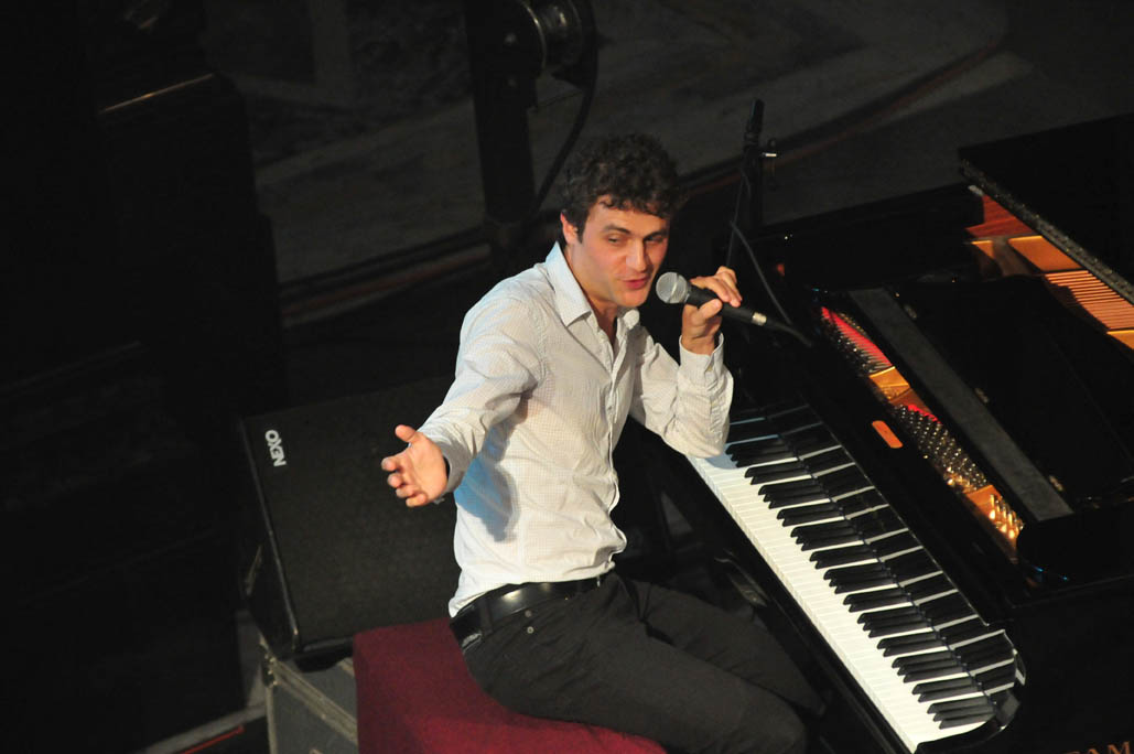 Luciano Supervielle en el lanzamiento de actividades de Bicentenario Uruguay. 15 de febrero 2011. Foto: Pata Torres